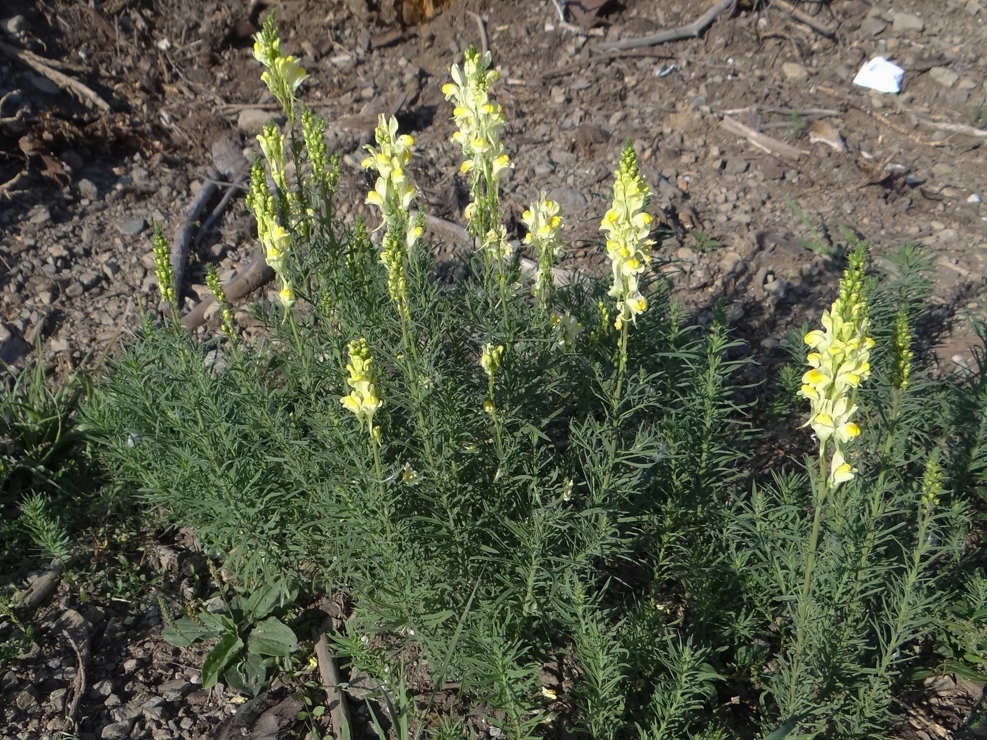 Linaria vulgaris (location: Slovakia, Slovensky raj)